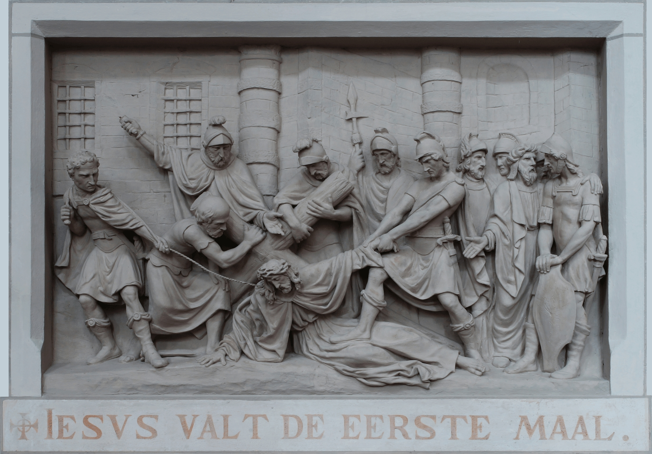 Sint-Leonarduskerk (Sint-Lenaarts). Kruisweg (3-de statie) (anno 1857) gemaakt door Hendrik Peeters-Divoort.